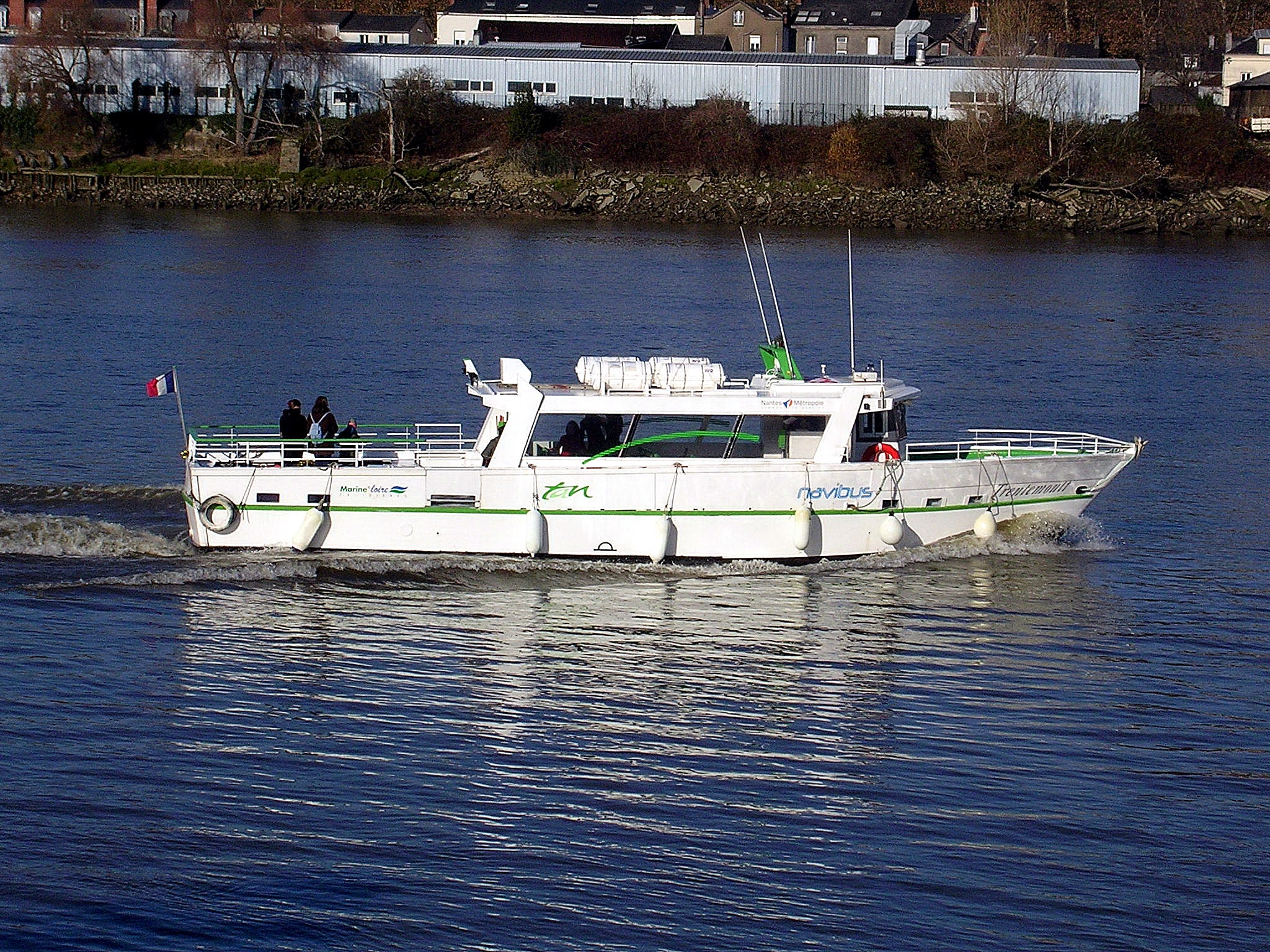 Liaison fluviale Nantes-Trentemoult. Photo prise par Jibi44.